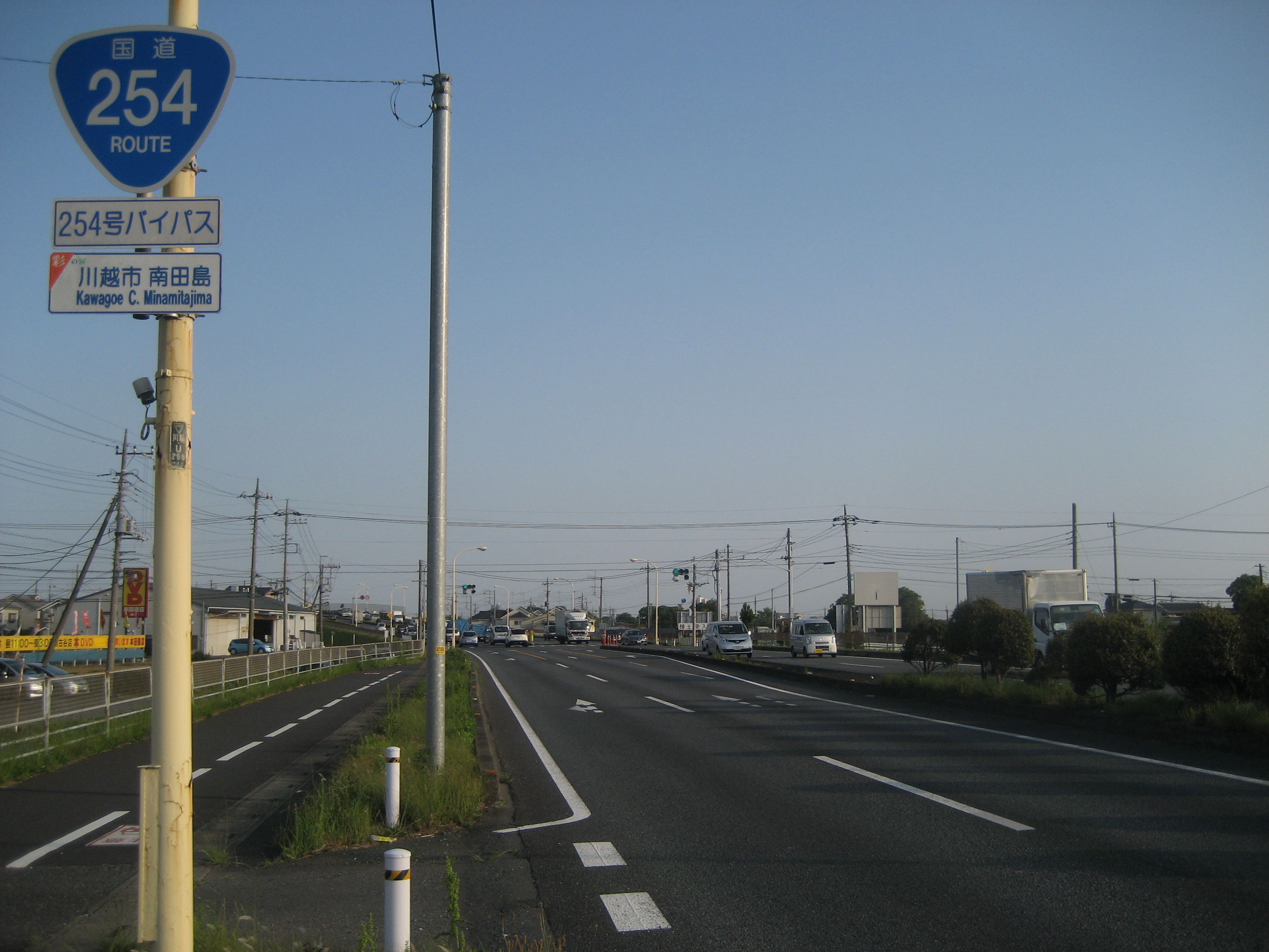 国道254号線富士見川越バイパス埼玉県川越市南田島付近（池袋方面を撮影）